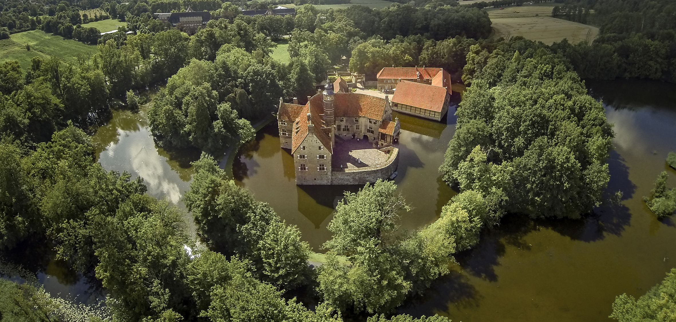 Luftaufnahme von Burg Vischering, Lüdinghausen This is a photograph of an architectural monument. /012